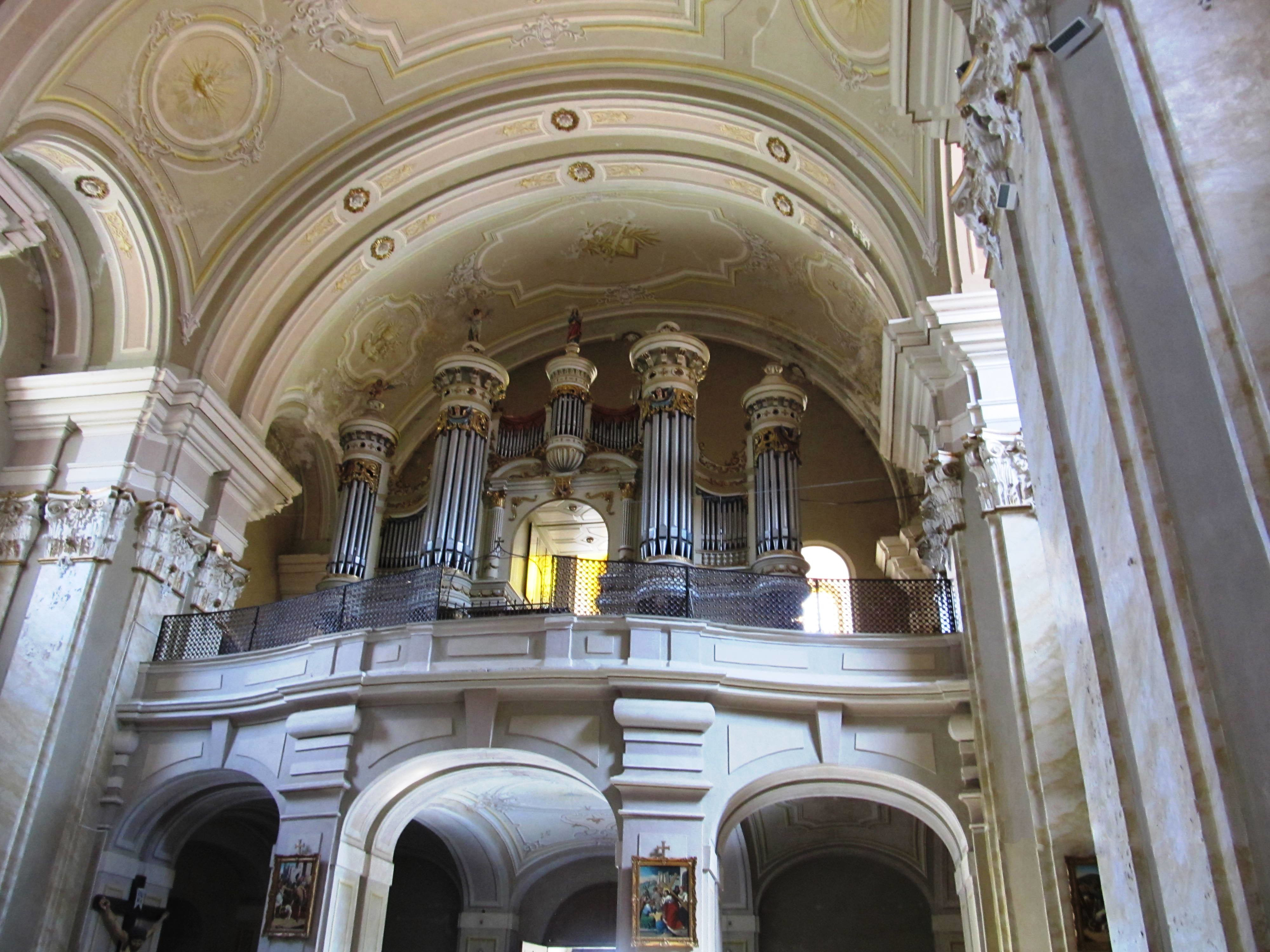 Orgel der Wallfahrtsbasilika Maria Radna in Lipova, Rumänien.